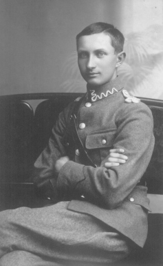 Stanisław Zdanowski w okresie służby w WP II RP